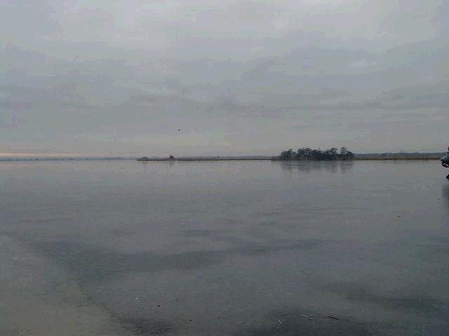 Een bevroren Leekstermeer